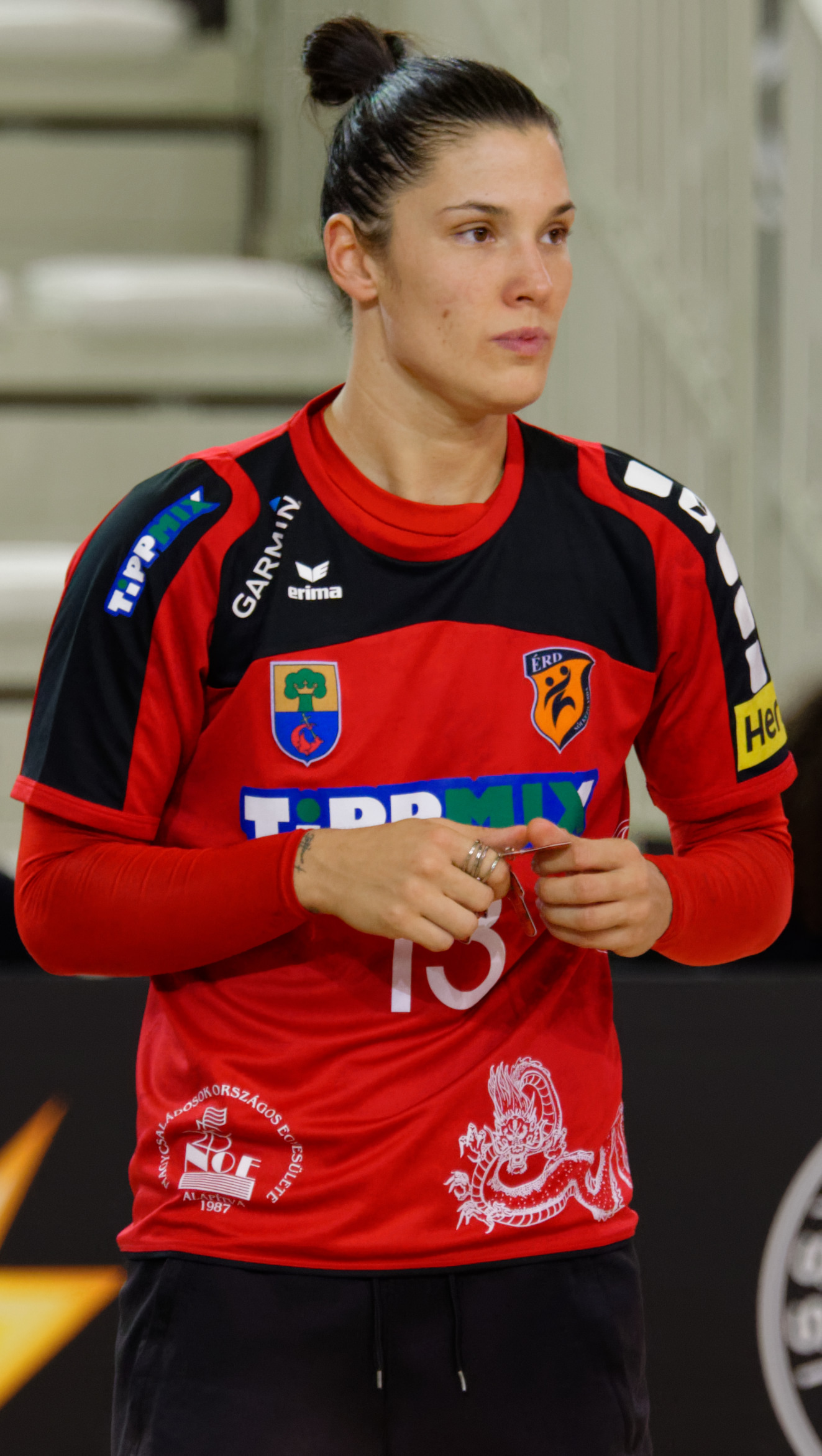 Rencontre retour du 3e tour de la coupe EHF, Issy Paris Hand / Erd. A Issy Les Moulineaux, le 18 novembre 2017.